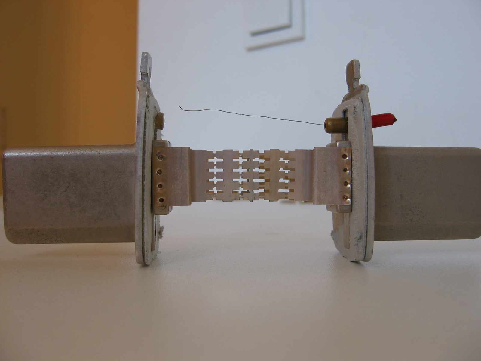 Geöffnete NH-Sicherung 200 A, zu sehen ist der Schmelzleiter und darüber der dünne Auslösedraht des Kennmelders (rechts)